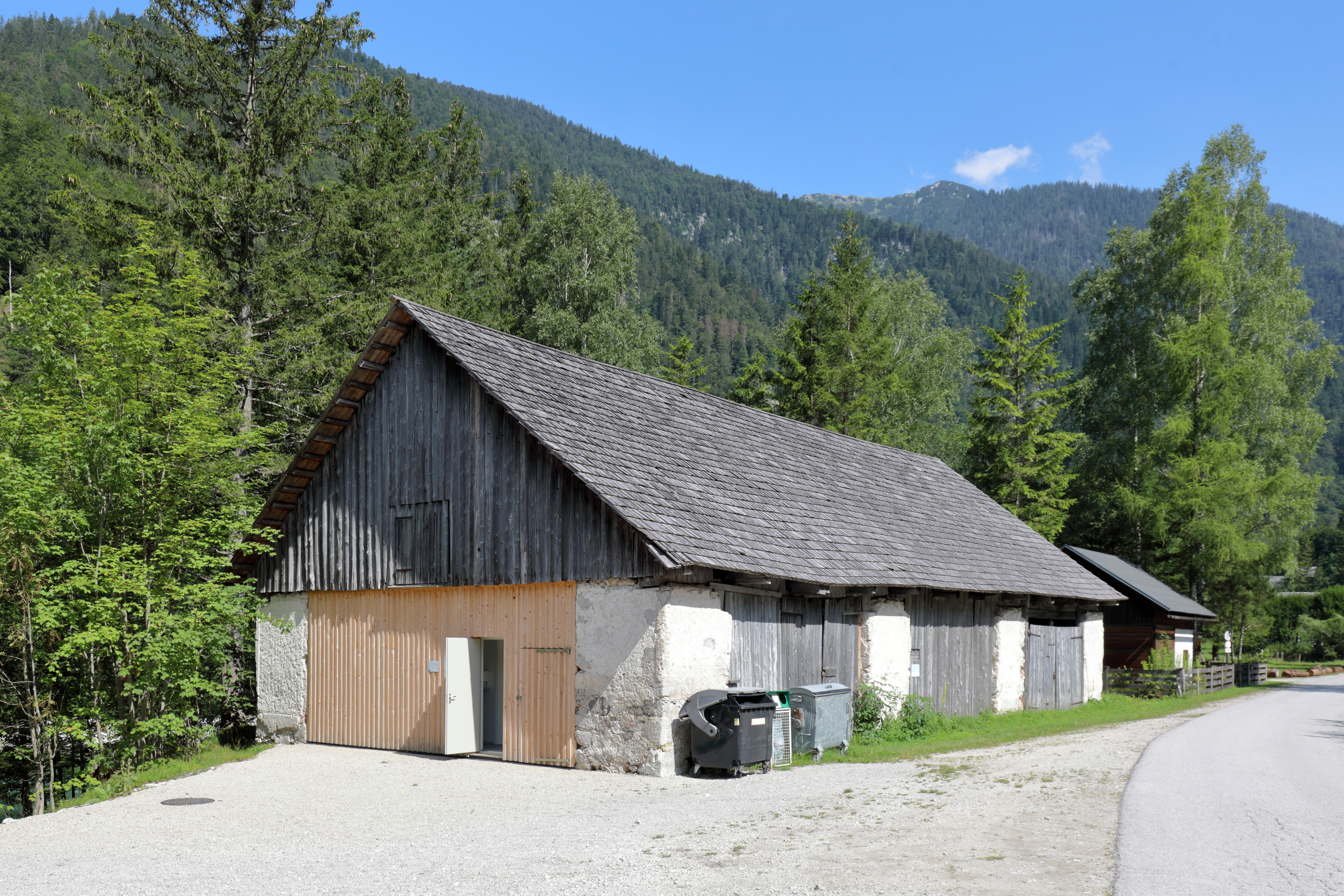 Der denkmalgeschützte Kohlbarren in Fachwerk, ein Ortsteil der steiermärkischen Gemeinde Wildalpen.